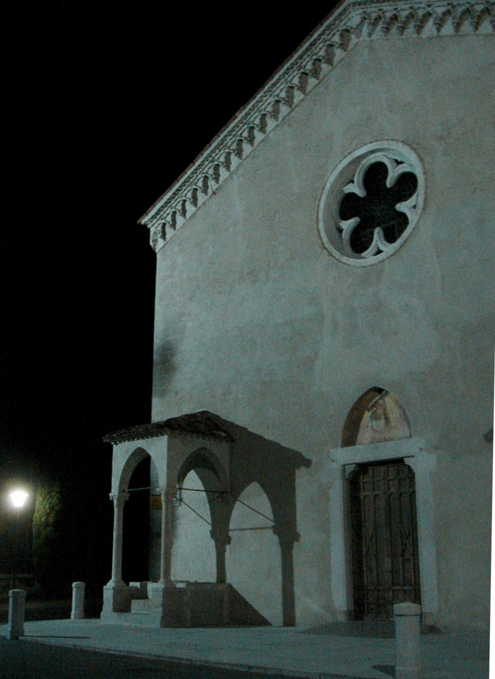 Serravalle di Vittorio Veneto (Treviso): notturno della facciata della pieve di Sant'Andrea di Bigonzo (XII secolo).